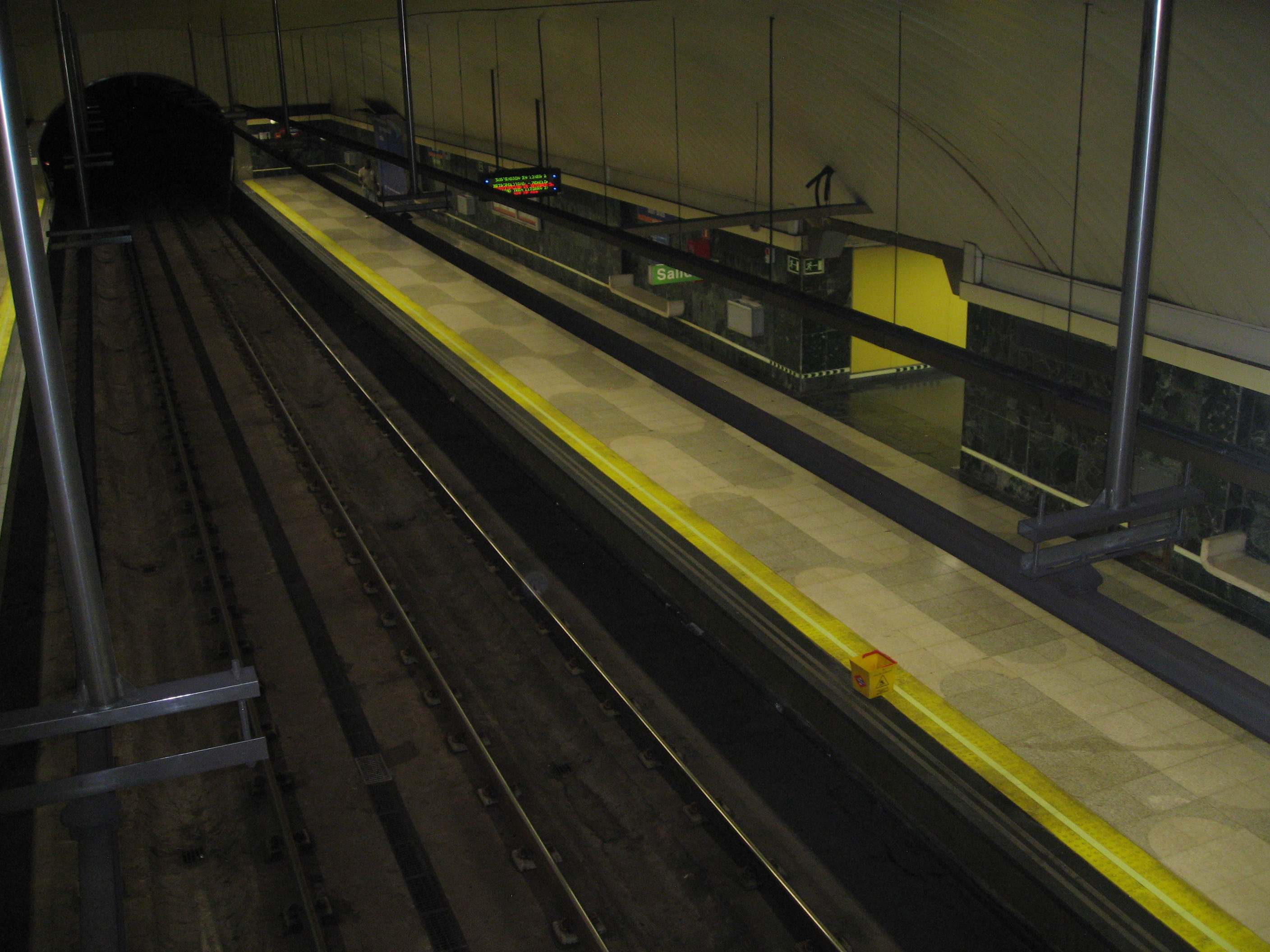 Vista de los andenes de la estación de San Blas